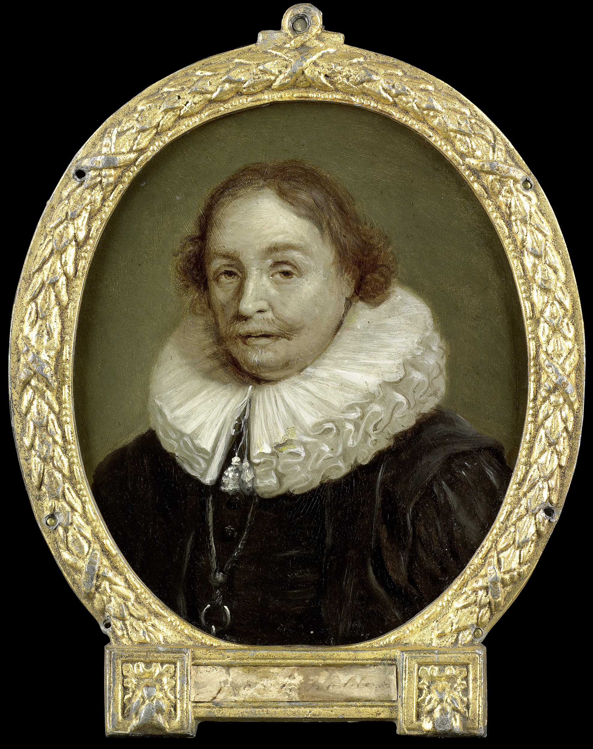 Portret van Piërius Winsemius (1586-1641). Hoogleraar in de welsprekendheid en de geschiedenis te Franeker. Buste in ovaal naar links. Onderdeel van een verzameling portretten van Nederlandse dichters. Collection: schilderijen; Panpoeticon Batavum